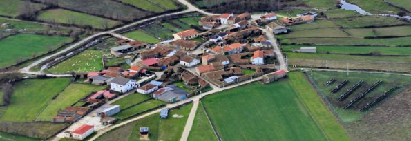 Vista global del municipio de Barceo. (2016)